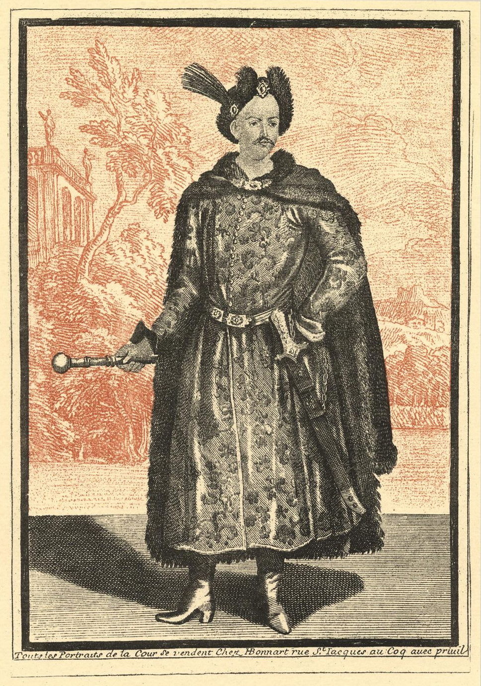 Беларуская (тарашкевіца): Партрэт Юзэфа Багуслава Слушкі (Juzef Bahusłaŭ Słuška)